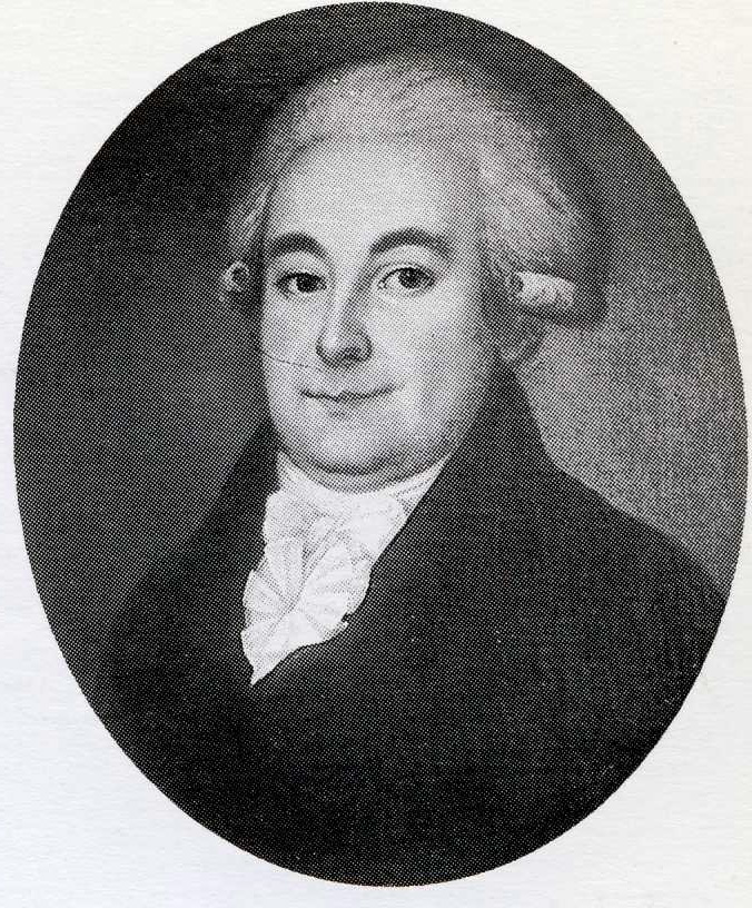 Turun akatemian rehtori Gabriel Erik von Haartman (1757–1810).